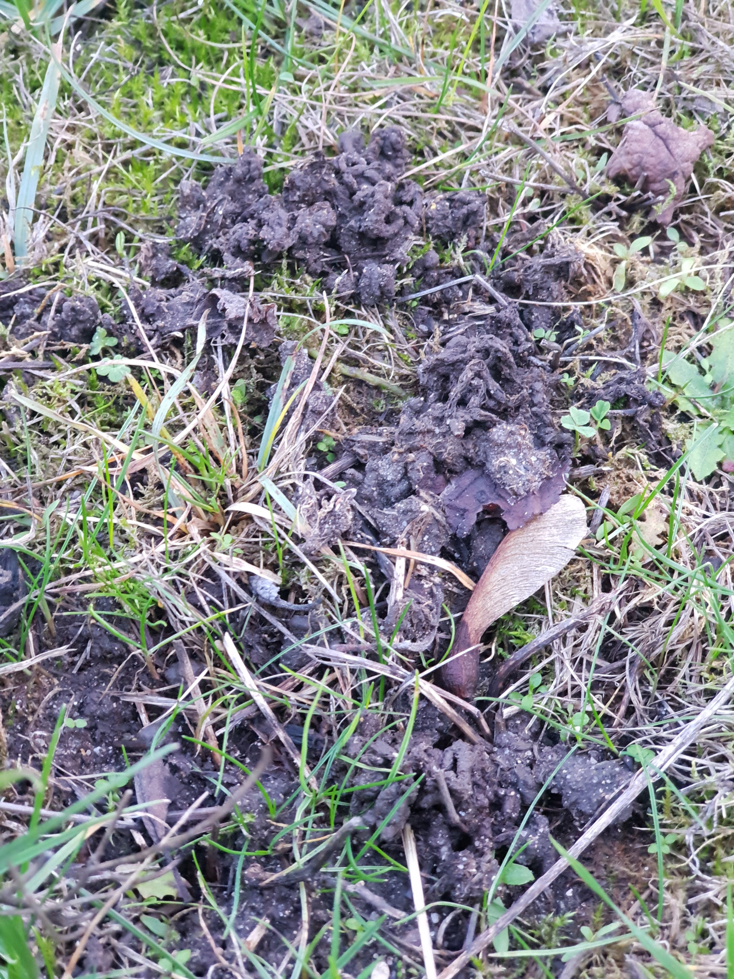 Turricules de vers anéciques en décembre dans une pelouse de jardin (France)